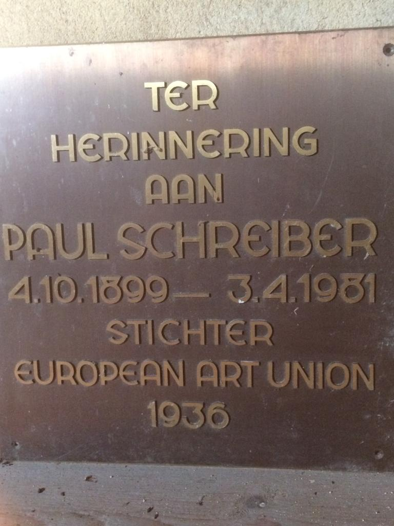 gevelplaquette Paul Schreiber opening Herder museum Zijderveld